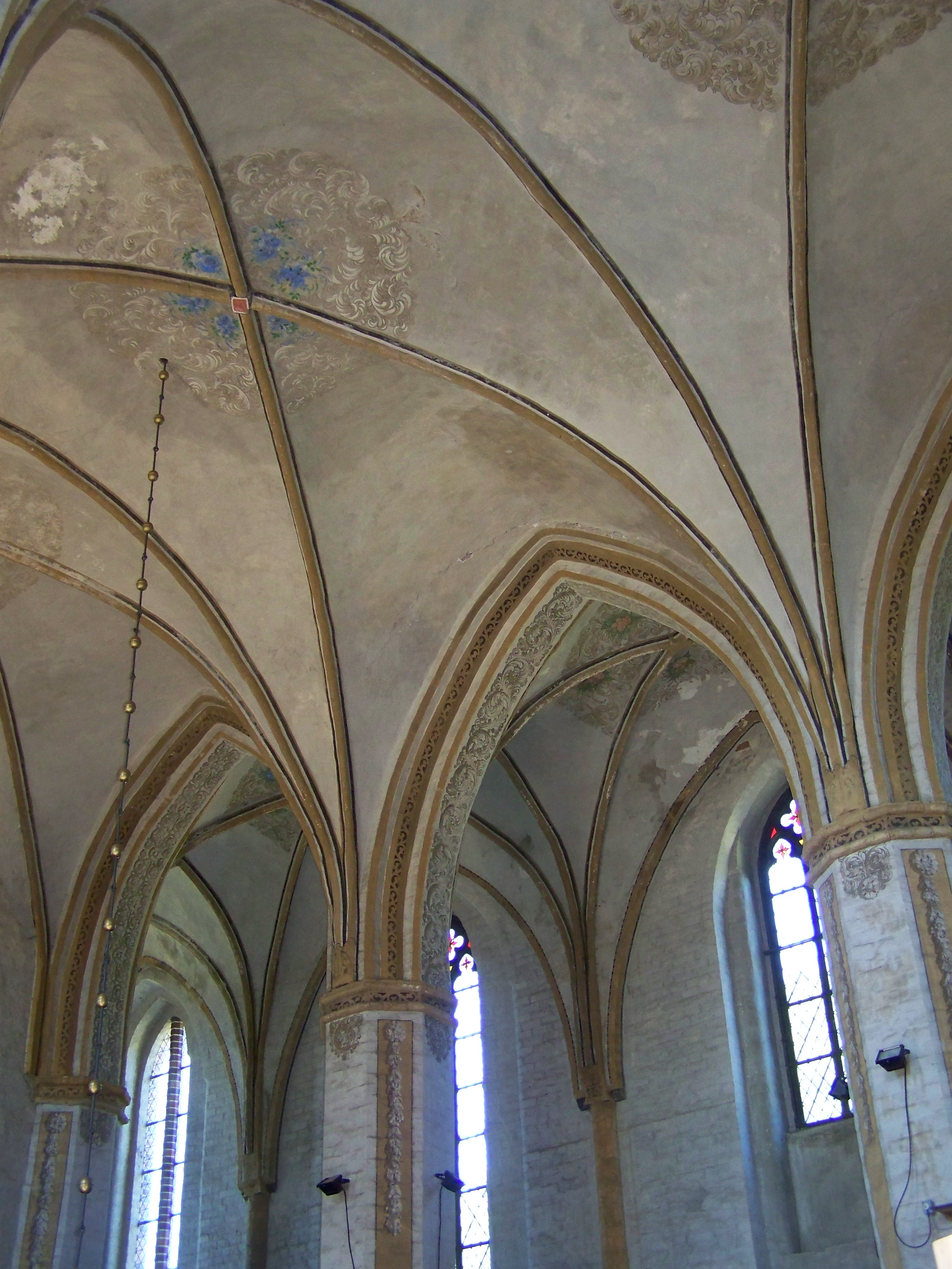 Brandshagen, Nordvorpommern, Dorfkirche, Decke